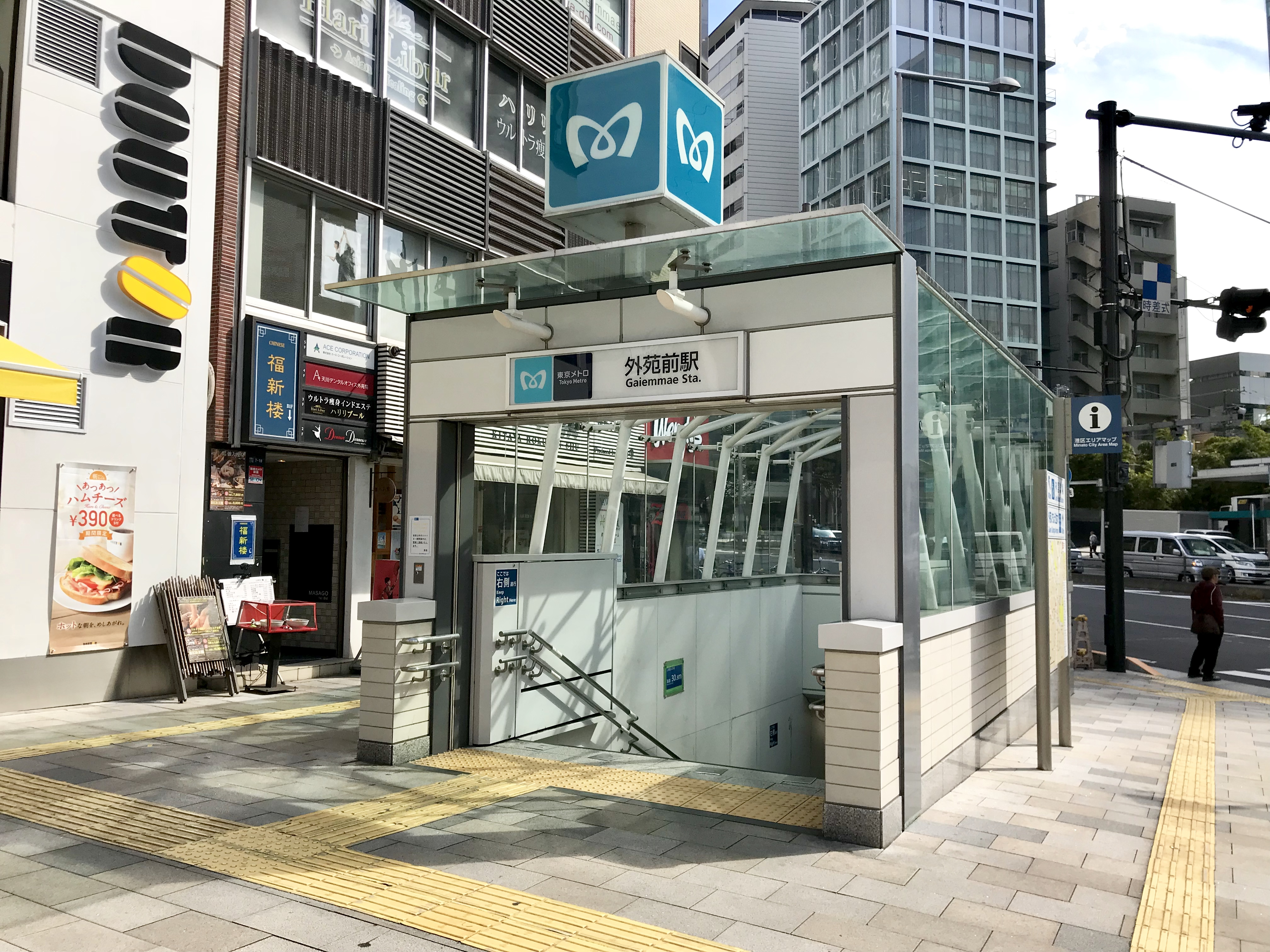 東京メトロ銀座線外苑前駅3番出入口（リニューアル後）